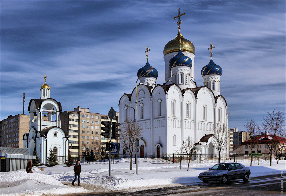 Маладзечанскія замалёўкі. Сабор Успення Прасвятой Багародзіцы